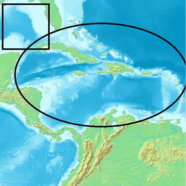 Vorkommen karibischer Riffkalmar